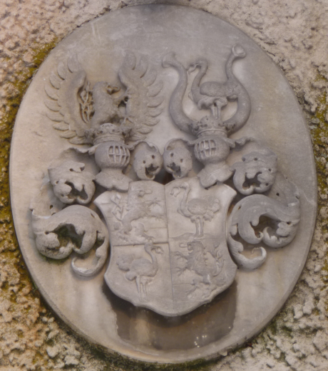 Schloss Steinhaus: Türwappen